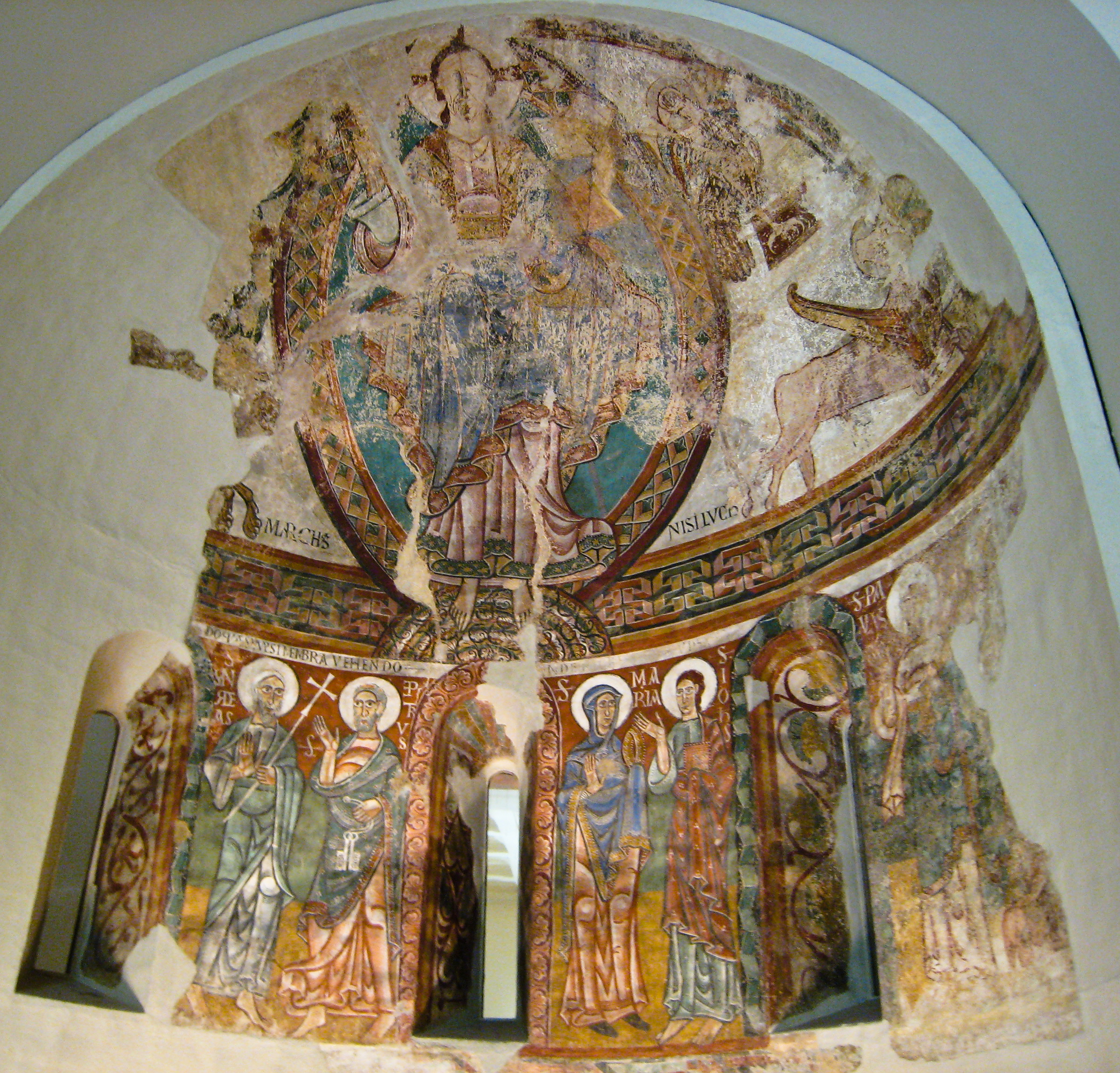 Absis de l'església de Sant Miquel (o Sant Pere) de la Seu d'Urgell, actualment es troba al Museu Nacional d'Art de Catalunya